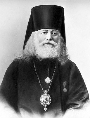 Владимир (Благоразумов), еп. Благовещенский. Фотография. Нач. XX в. (РГИА)